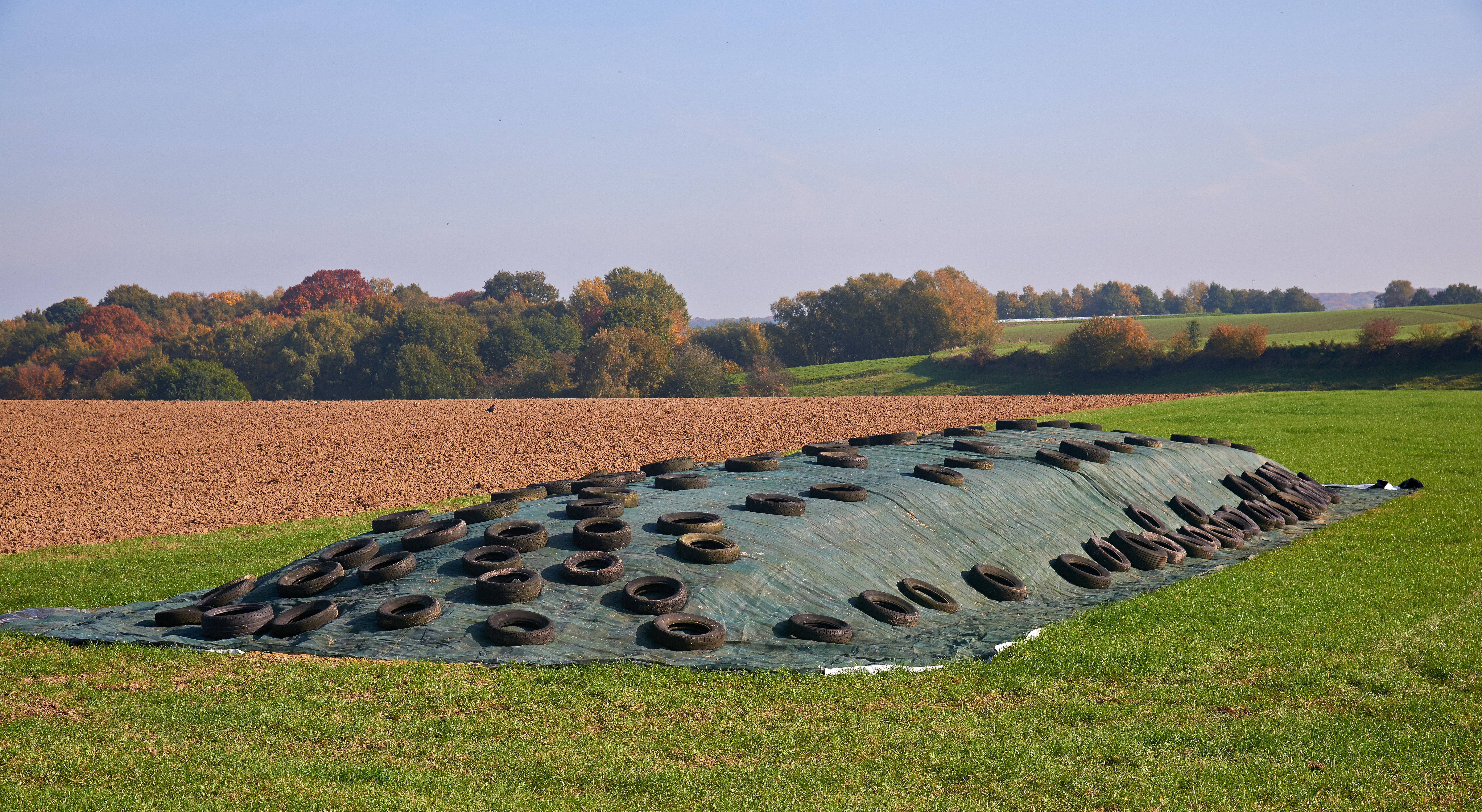 Het gebruik van oude autobanden bij het afdekken van landbouwproducten. Silobanden genoemd voor deze toepassing. De foto is genomen in België.